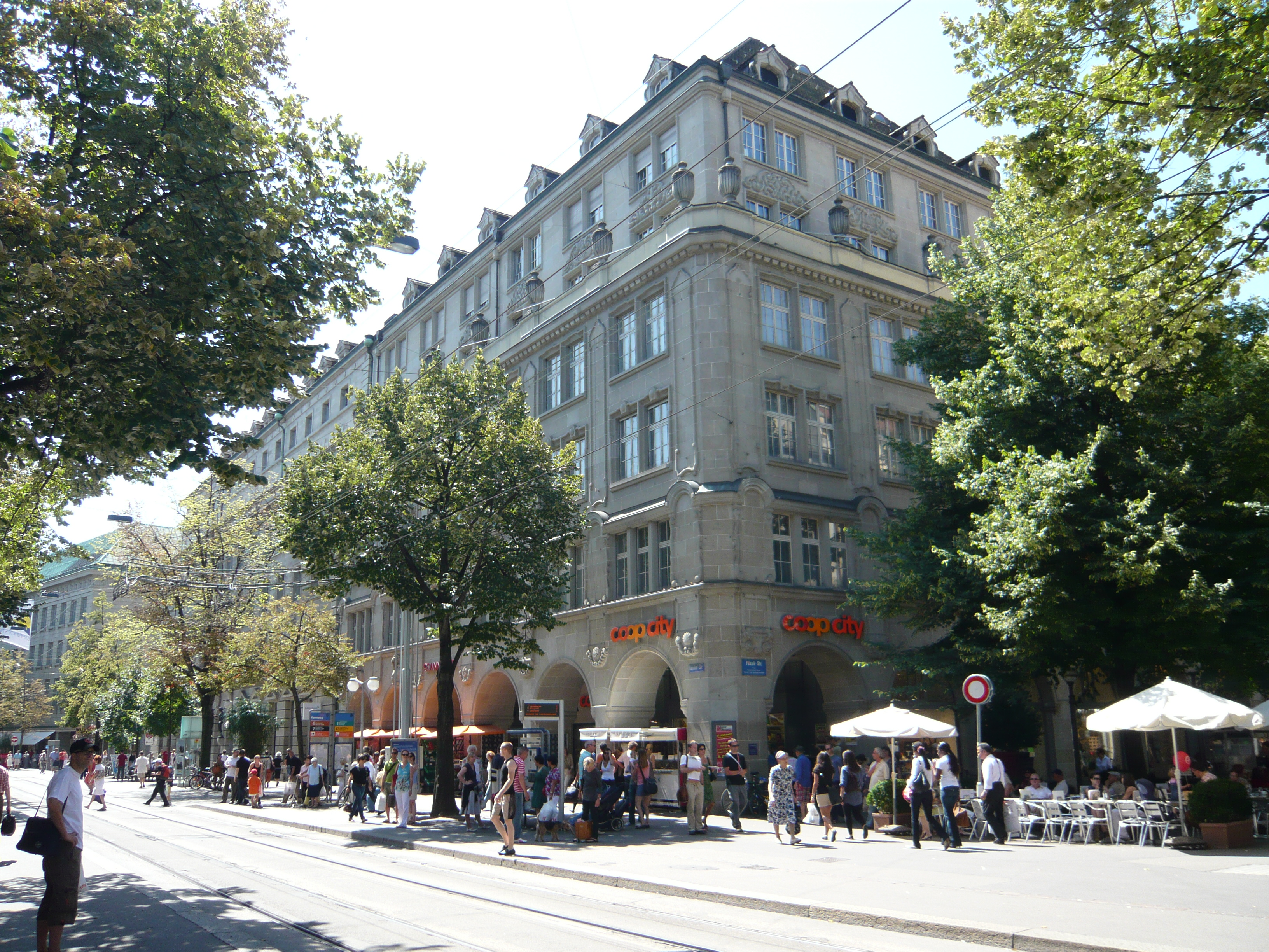 Die coop-Filiale im St. Annahof in Zürich